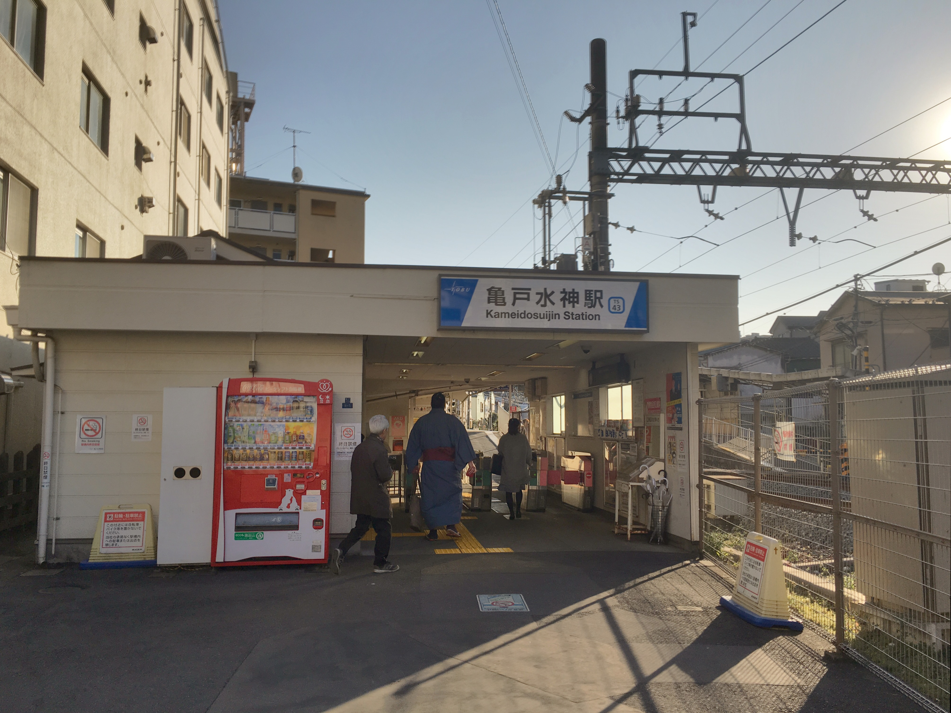 亀戸水神駅 (Kameidosuijin Station)